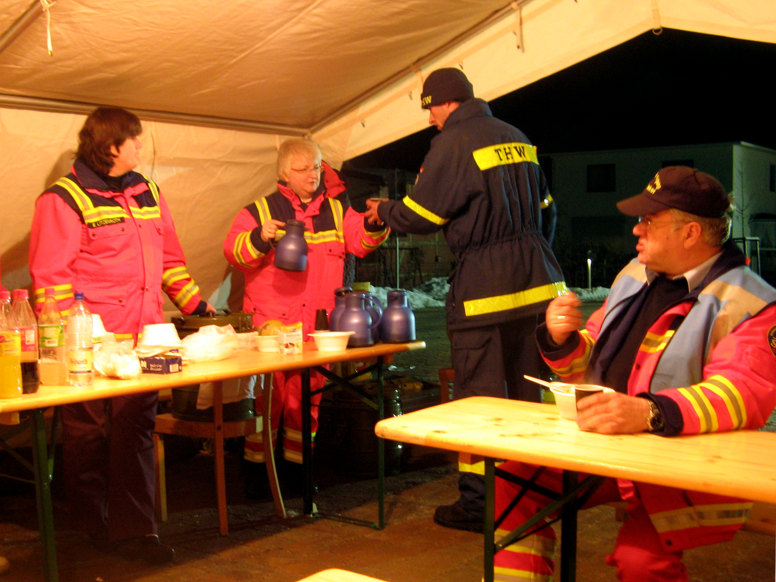 Die Betreuungsgruppe des DRK Reinfeld verpflegt Helfer des THW OV Ahrensburg beim Hochwasser Einsatz Herrenteich 2010